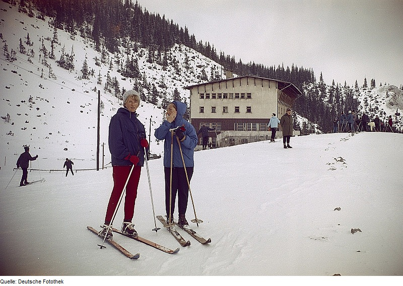 Original image description from the Deutsche Fotothek Hohe Tatra (Polen) (?). Skifahrer